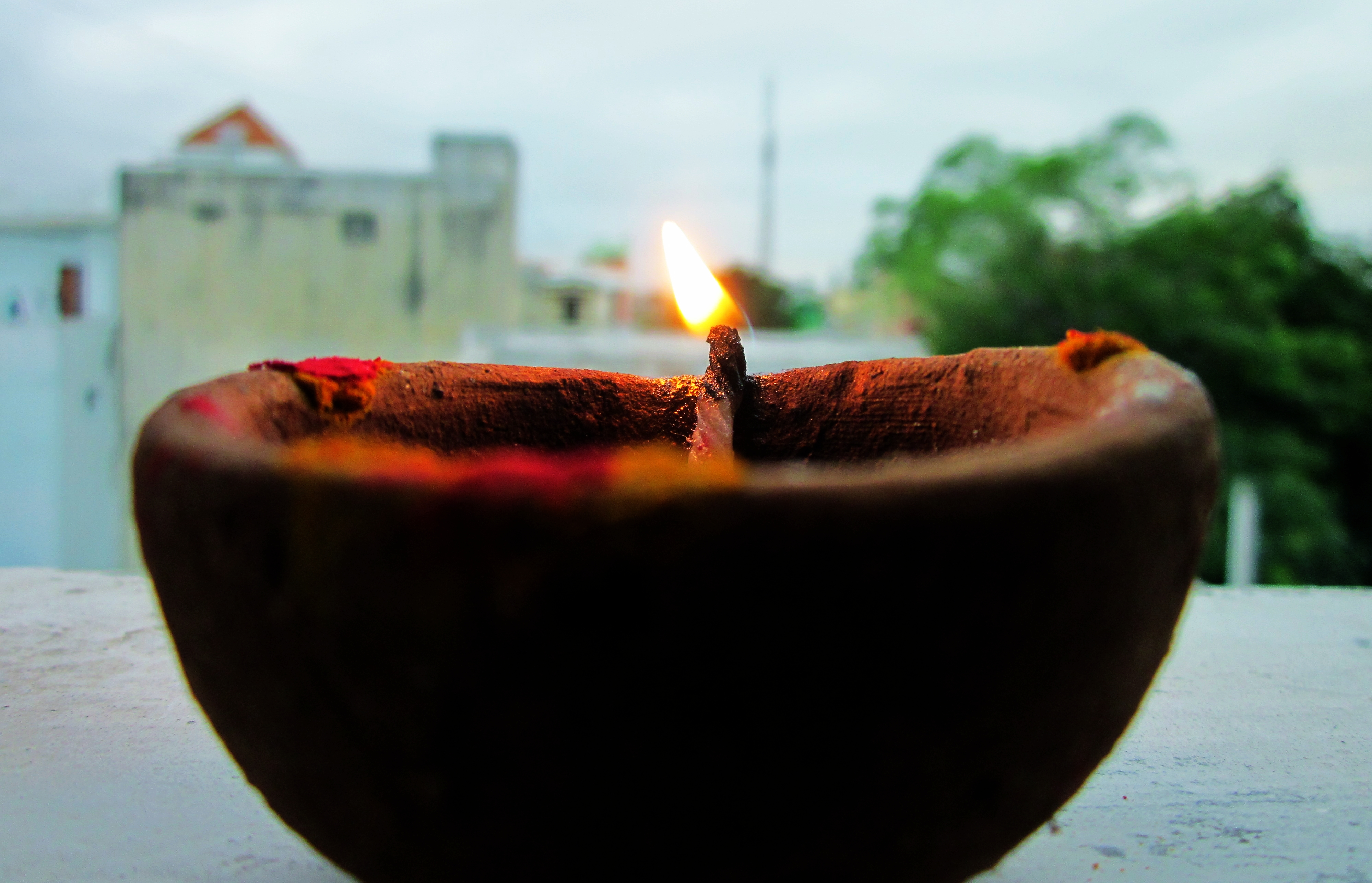 தீபத்திருவிழா நாட்களிலும் பிற பொது நாட்களிலும் வீடுகளில் ஏற்றப்படும் அகல் விளக்கு